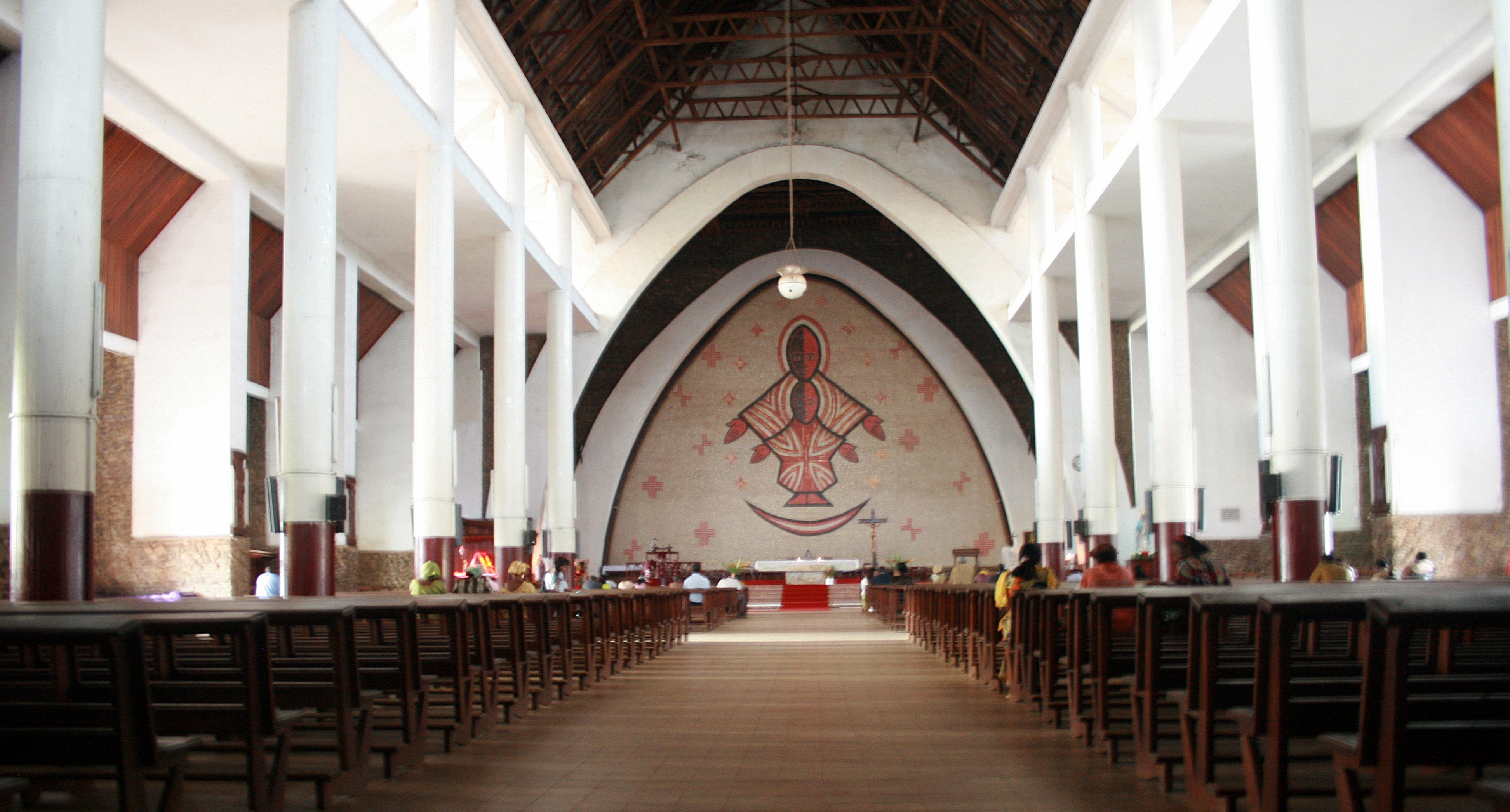 Intérieur de la Cathedrale de Yaoundé